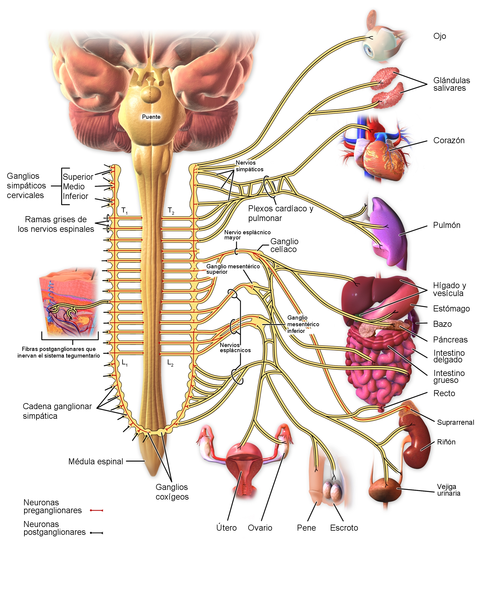 Esquema del sistema nervioso simpático humano.